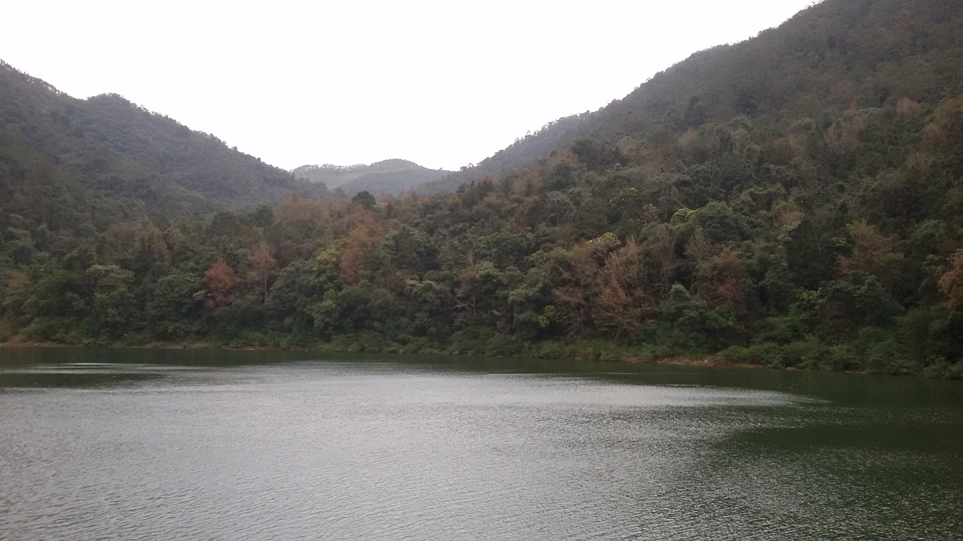 粵語: （石門國家森林公園）水景紅葉——紅楓湖